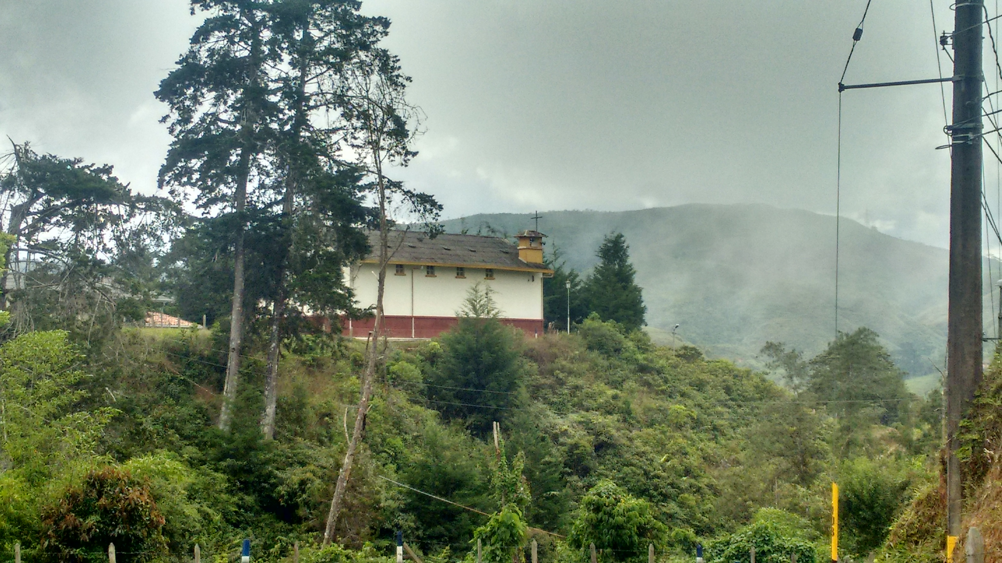 Capilla del Sagrado Corazón de Jesús ubicada en el corregimiento El Salto (Gómez Plata), perteneciente a la Diócesis de Santa Rosa de Osos.